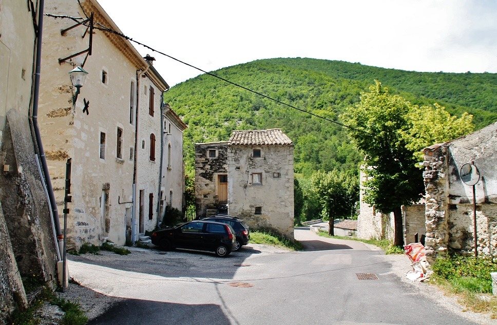 Rue du Village